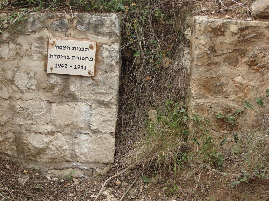 מצדה על כרמל - 1